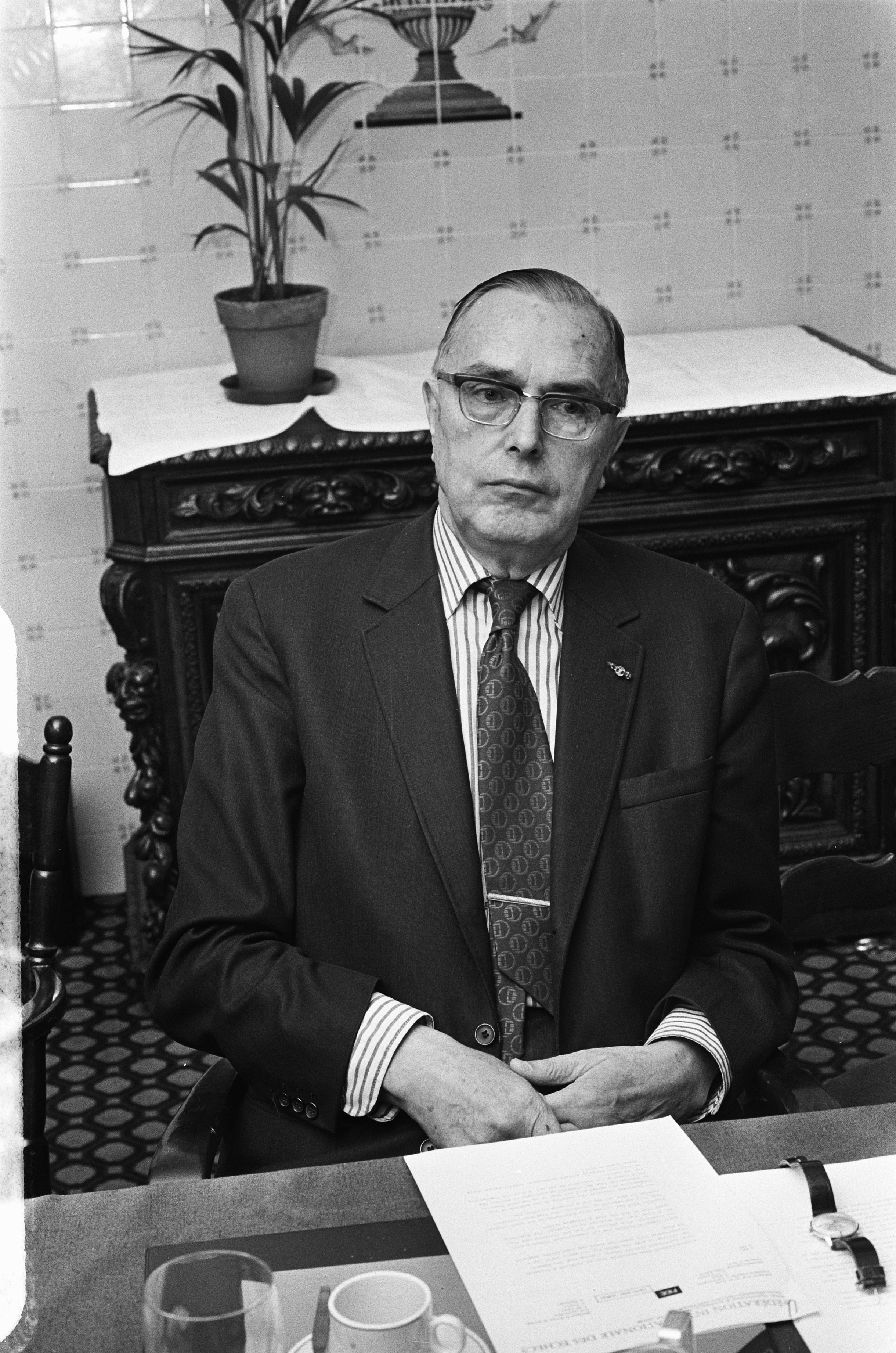 Collectie / Archief : Fotocollectie Anefo Reportage / Serie : [ onbekend ] Beschrijving : Persconferentie Fidepresident Max Euwe in Amsterdam; toehoorders Timman (l) en Donner Datum : 2 april 1975 Locatie : Amsterdam, Noord-Holland Trefwoorden : persconferenties, toehoorders Persoonsnaam : Euwe, Max Fotograaf : Croes, Rob C. / Anefo Auteursrechthebbende : Nationaal Archief Materiaalsoort : Negatief (zwart/wit) Nummer archiefinventaris : bekijk toegang 2.24.01.05 Bestanddeelnummer : 927-8489